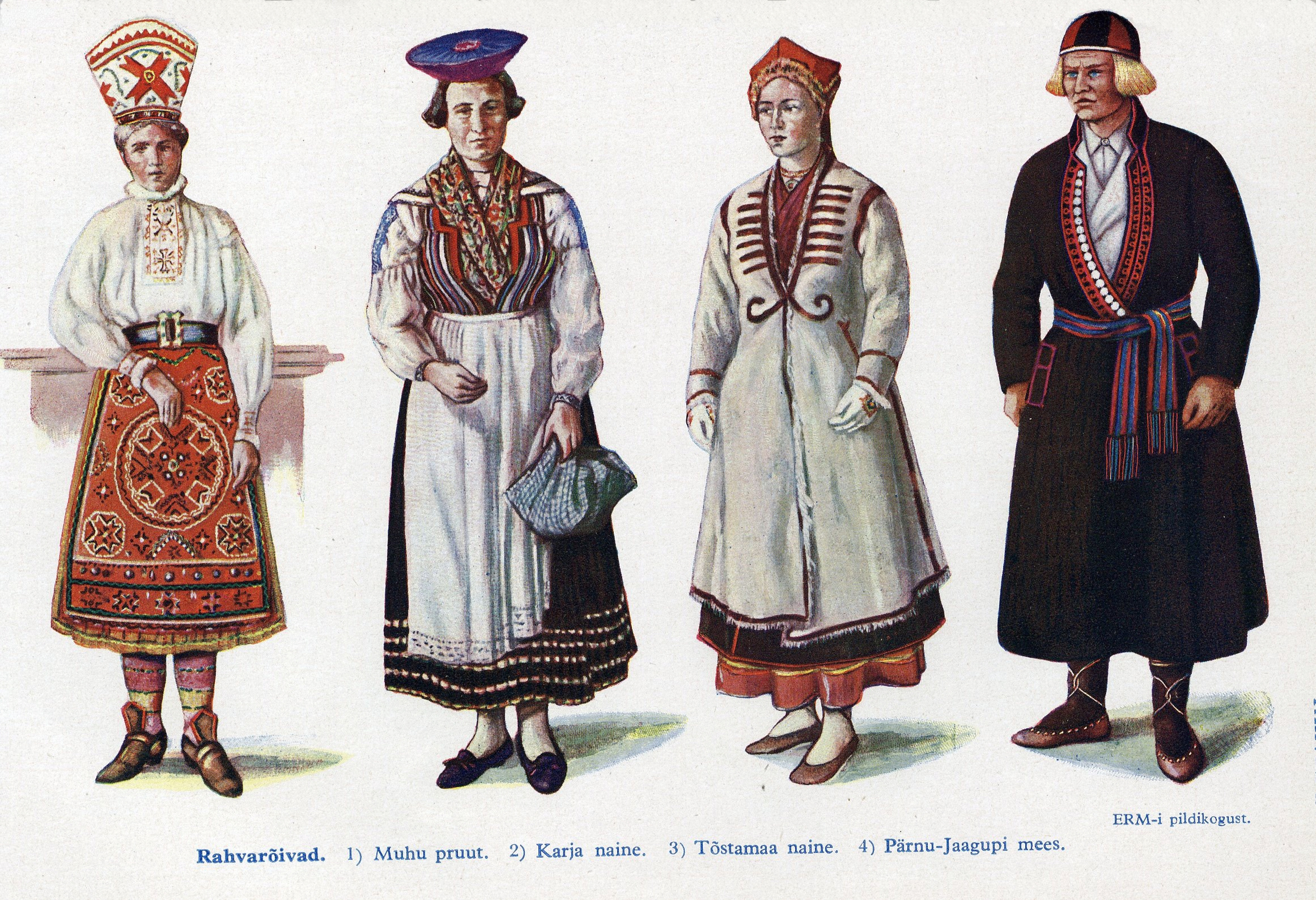 Rahvarõivad. 1) Muhu pruut. 2) Karja naine. 3) Tõstamaa naine. 4) Pärnu-Jaagupi mees. ERM-i pildikogust.